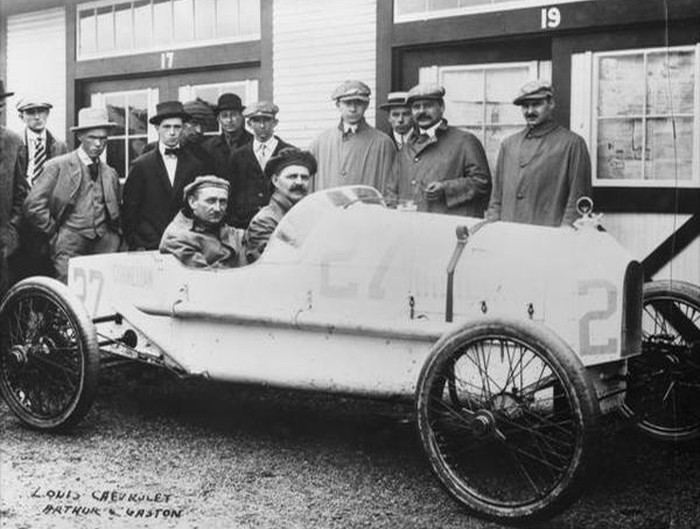 Photographie des trois frères Chevrolet vers 1910